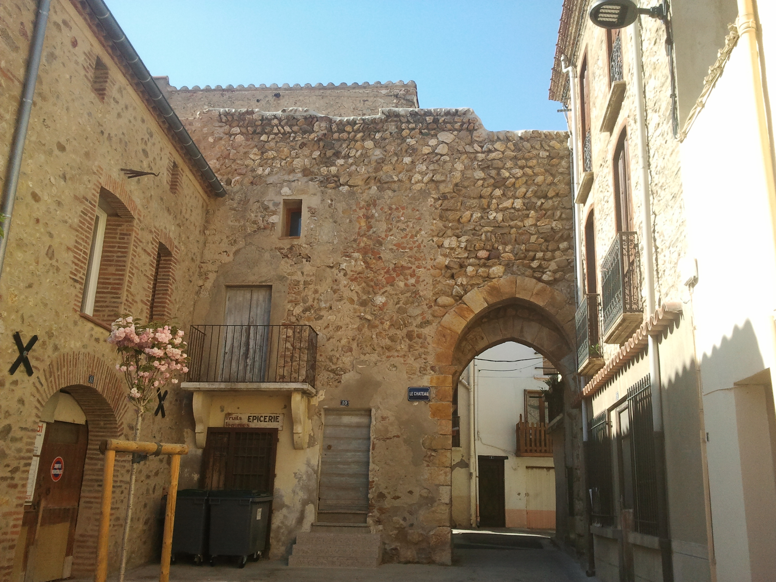 Vestiges du château et porte fortifiée à Fourques, XIIIe, XIVe siècle